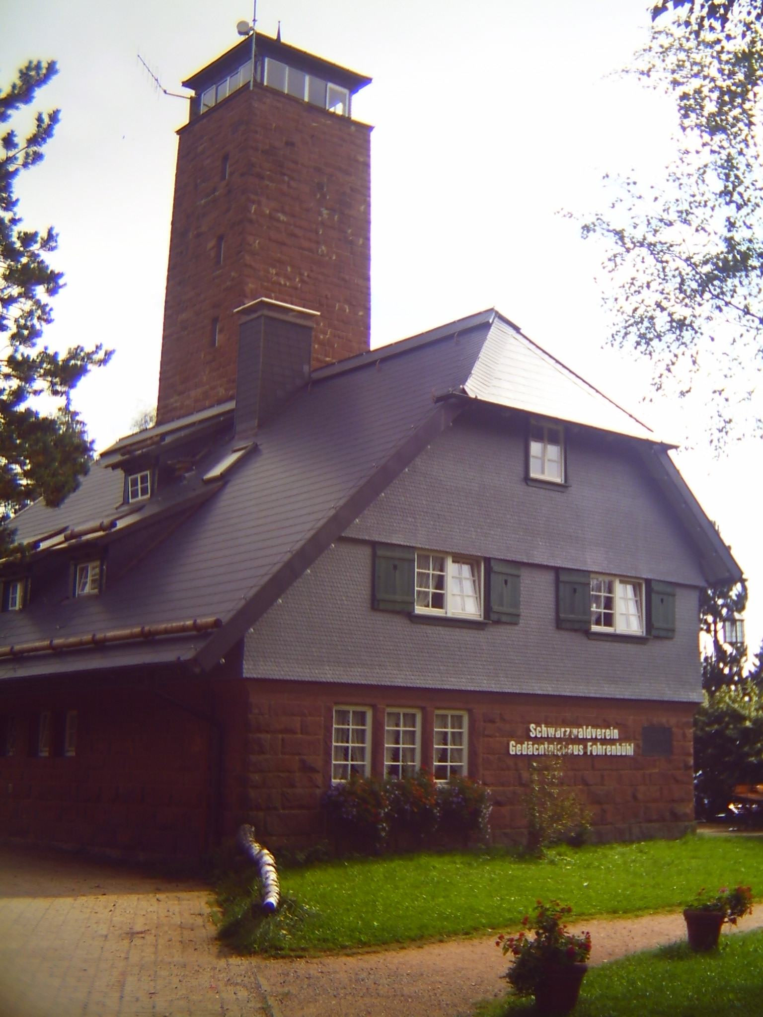 am Mittelweg beim Gedächtnisshaus auf dem Mooswaldkopf bei Lauterbach